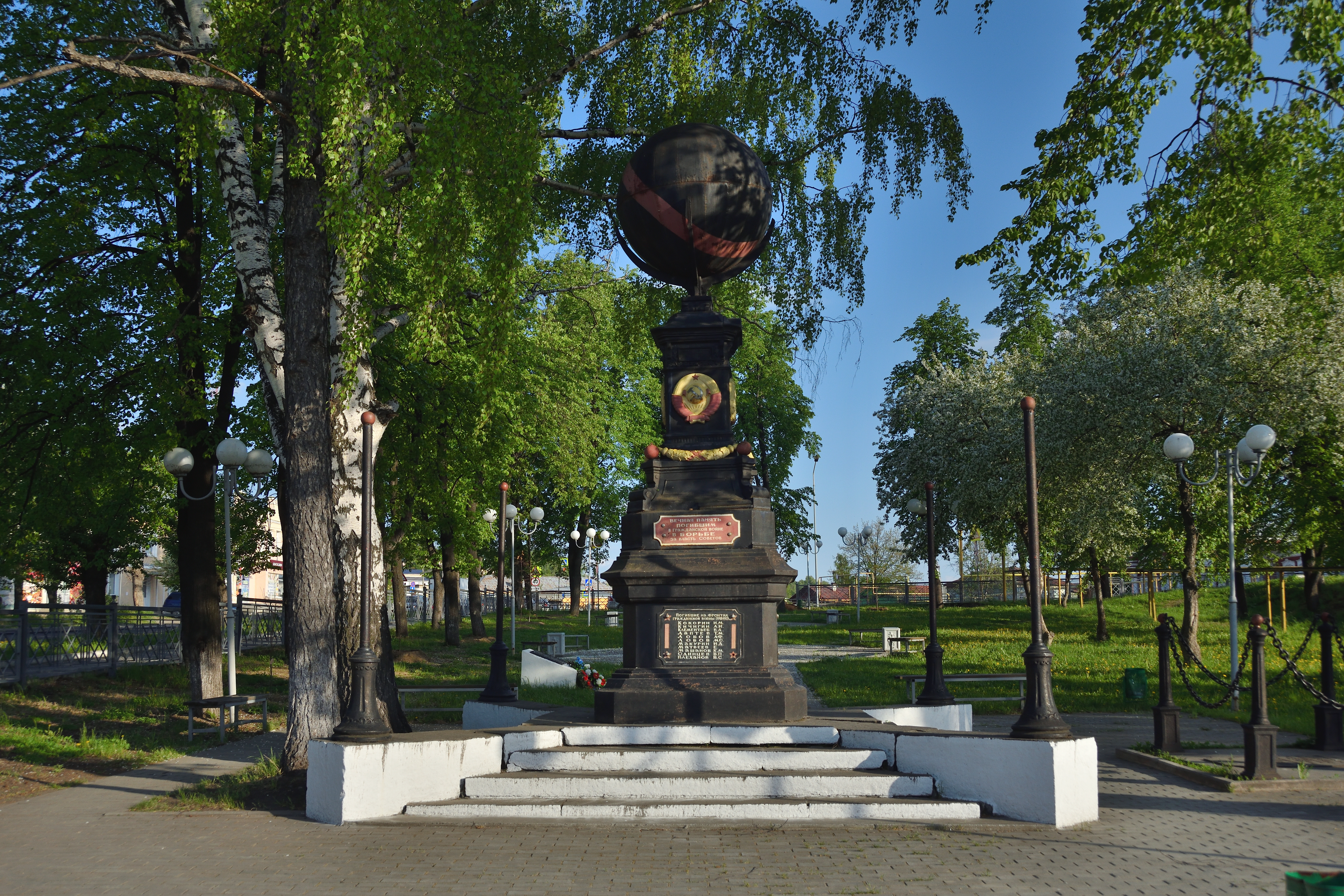 Братская могила борцов за Советскую власть: площадь Революции, Верх-Нейвинский, Свердловская область